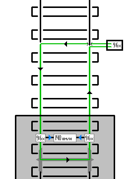 Werking ATB-EG, eigen tekening